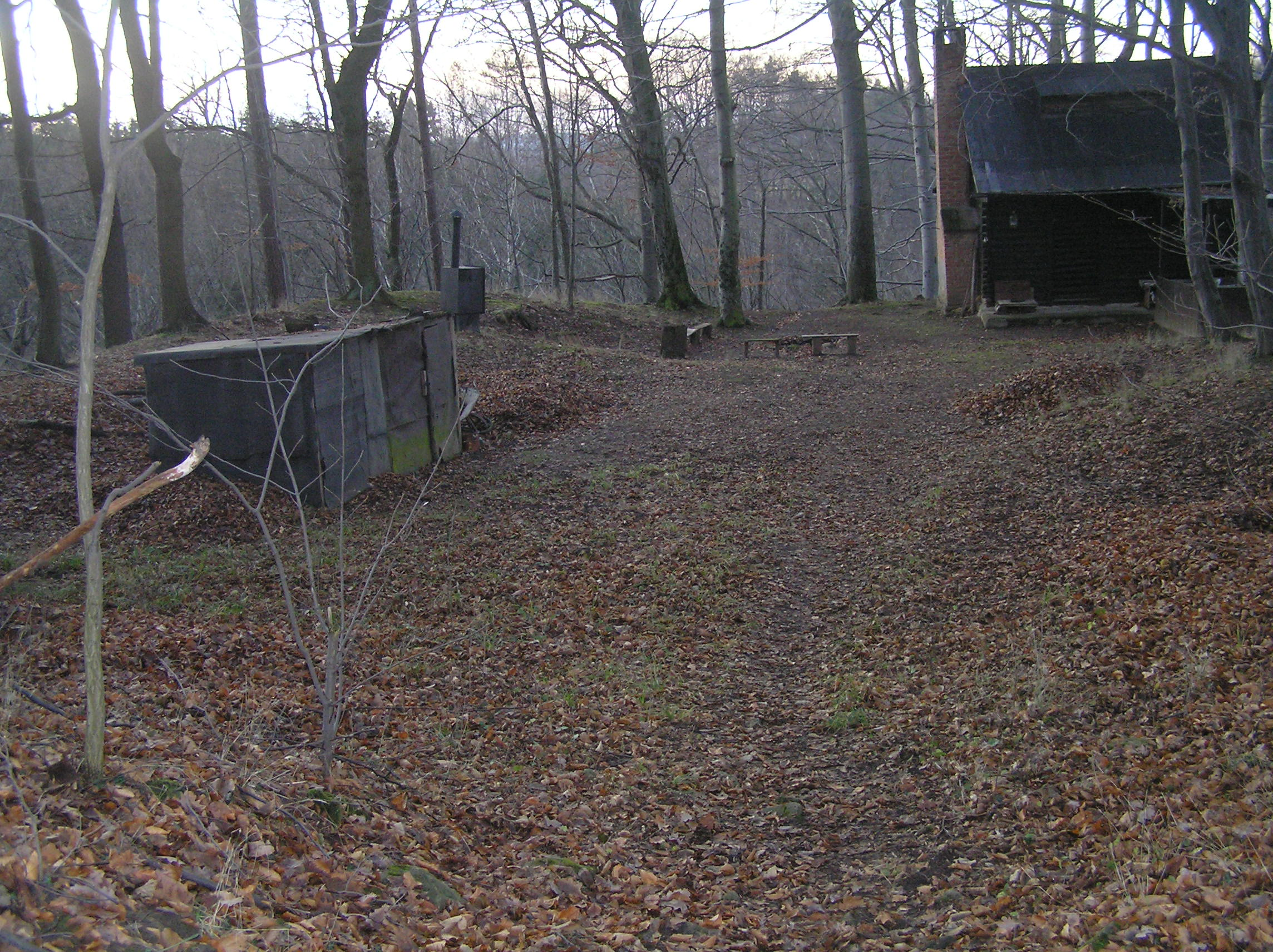 The castle Hrádníky, Czech Republic